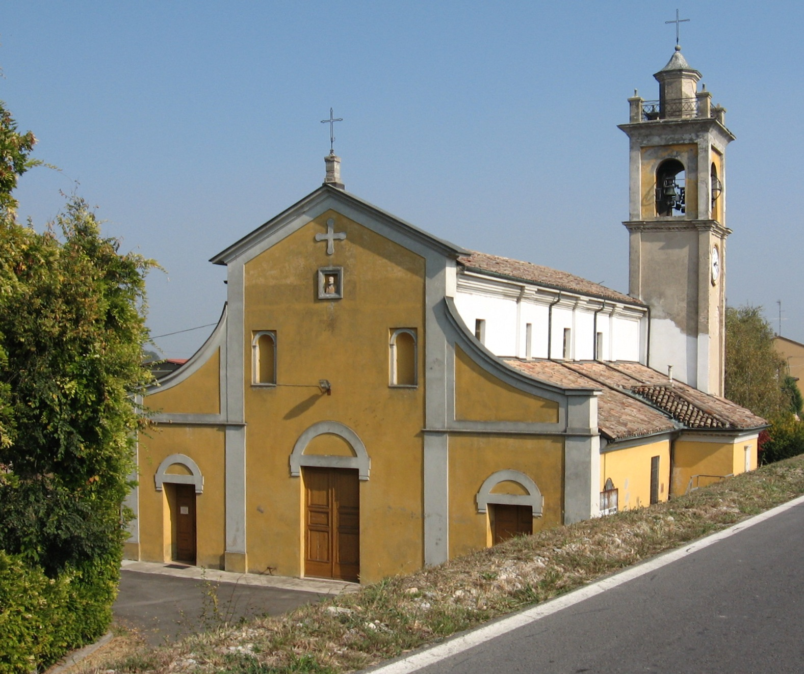 chiesa di San Pietro presso Copermio (PR)